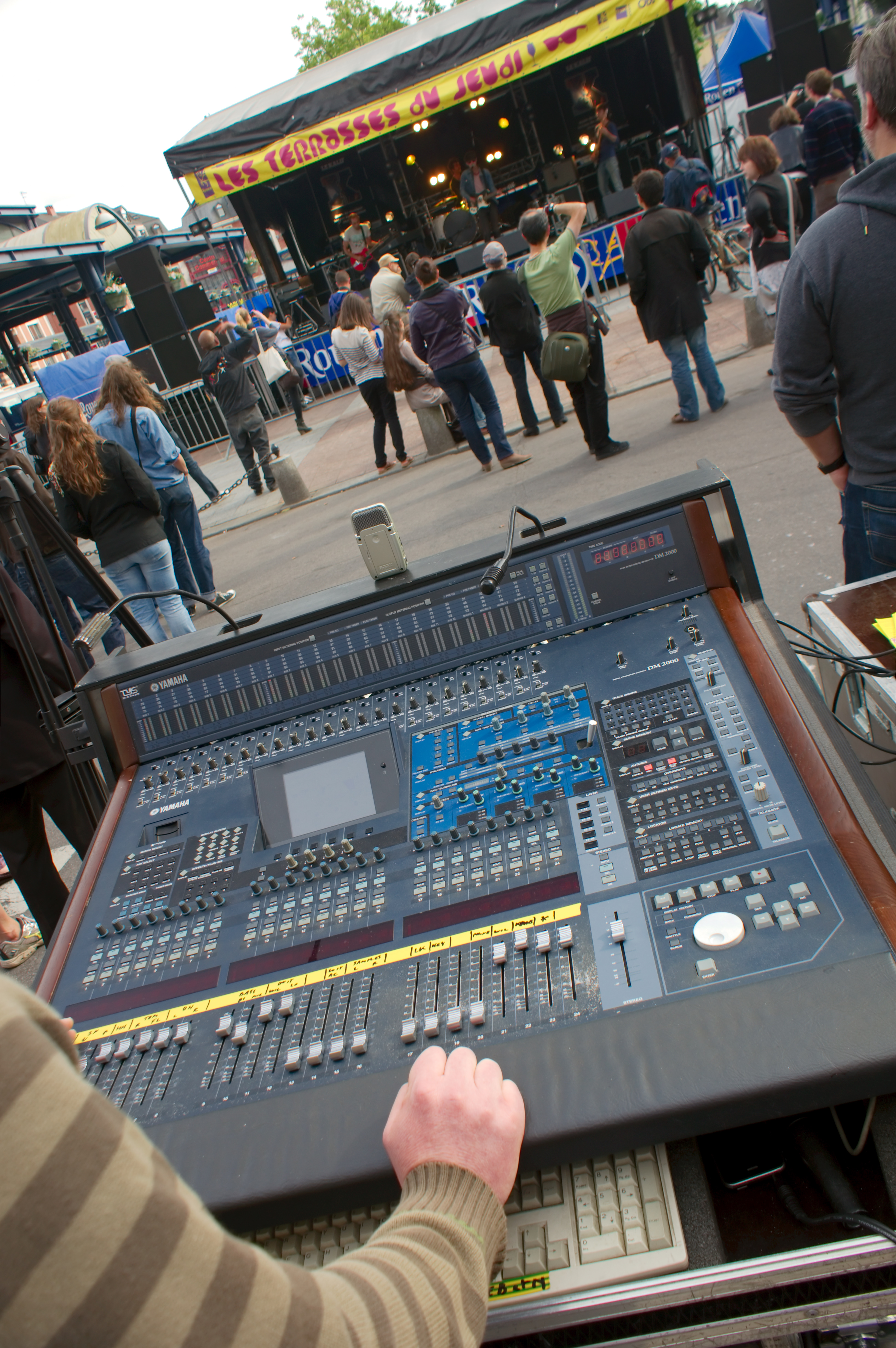 Yamaha DM2000 Digital Production Console Terrasses du Jeudi 2011 à Rouen